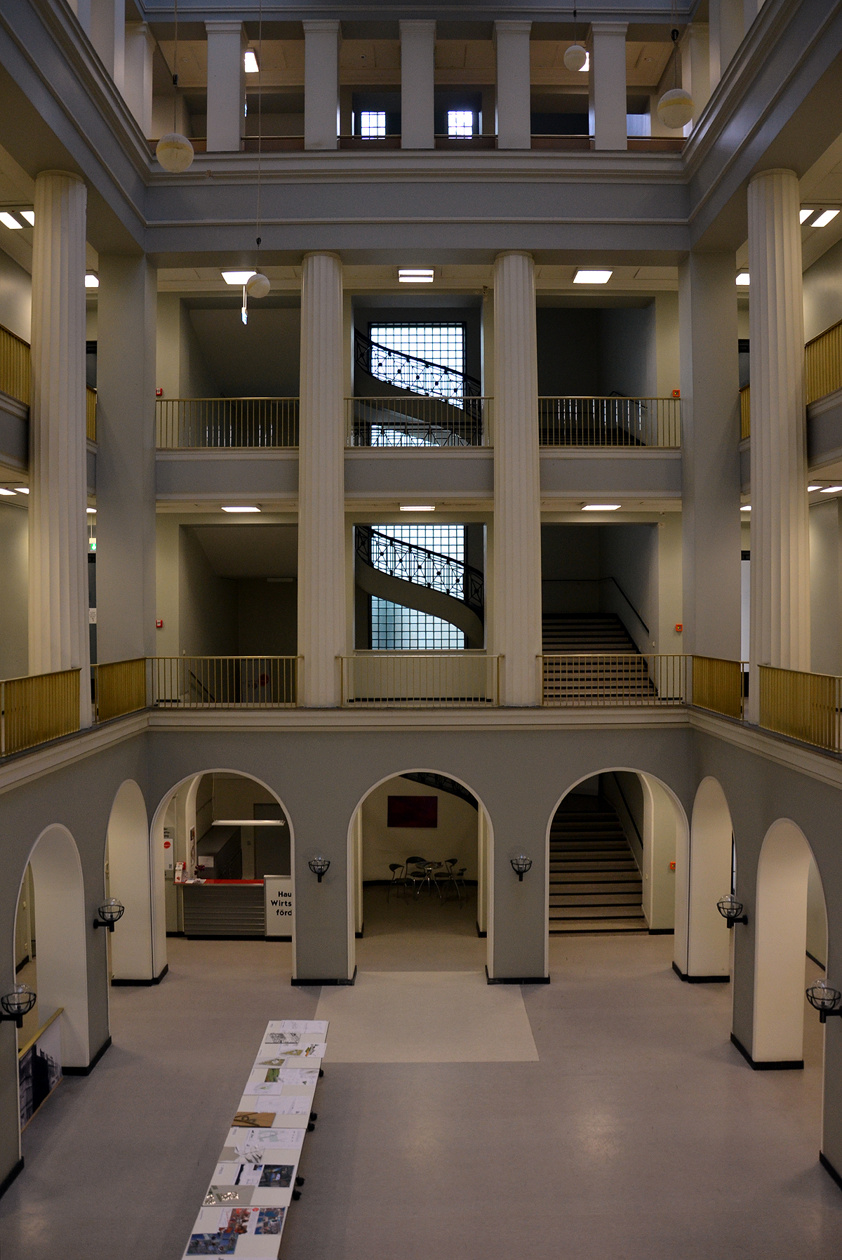 Die Ausstellung der prämierten Entwürfe von Architekturstudenten der Leibniz Universität Hannover für Bauten an der Hildesheimer Straße, ausgestellt im Foyer des Haus der Wirtschaftsförderung, Vahrenwalder Straße 7: Die Ausstellung wurde am 16. April 2014 eröffnet unter dem Titel "Hildesheimer Strip"("Stegreif-Serie") ...